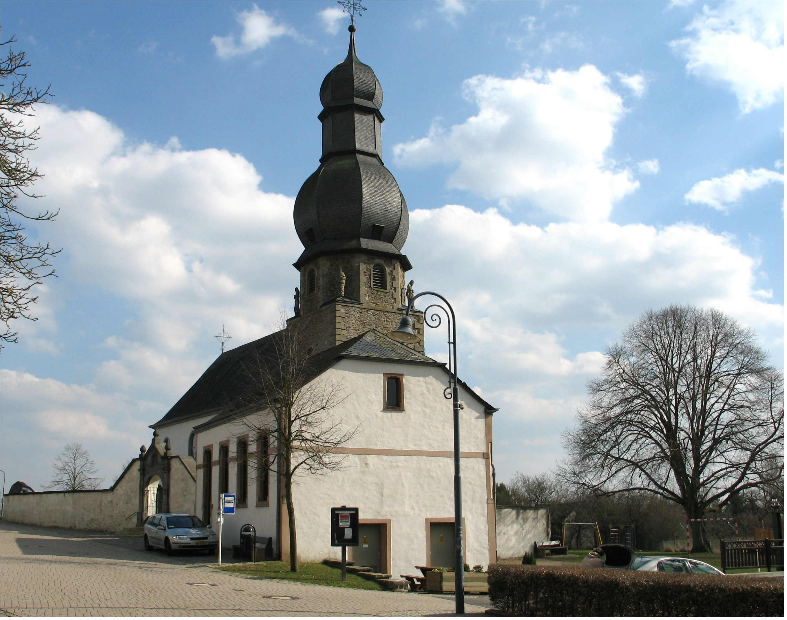 Bei der Kierch zu Wäicherdang